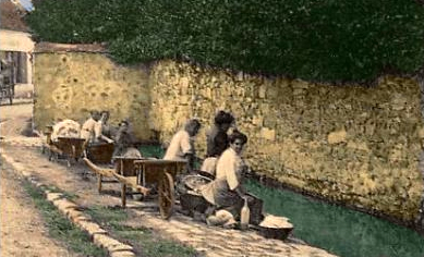 Des lavandières à Esmans vers 1900